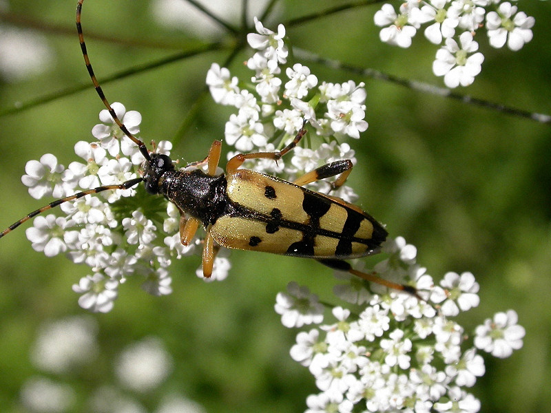 Gefleckter Schmalboch, Strangalia maculata, Nationalpark Hainich, Thüringen, Baumwipfelpfad, Germany